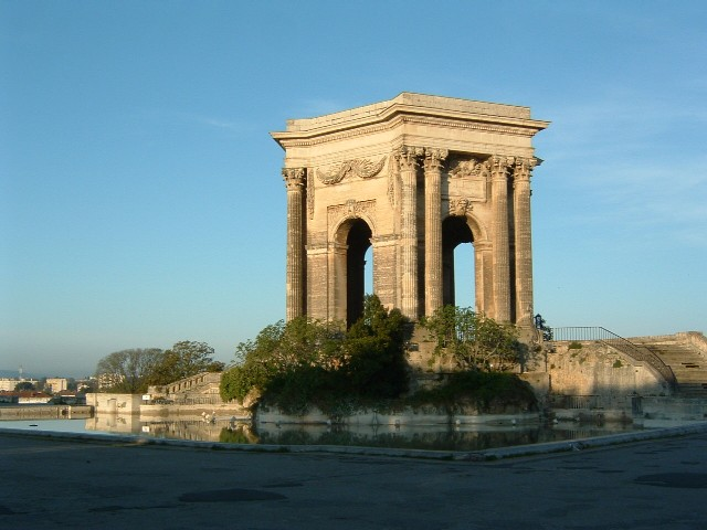 Montpellier : pavillon du Peyrou. Photo personnelle publiée sous license GFDL. Ce monument n'est pas l'Arc de Triomphe, mais le Château d'Eau édifié dans la 2e moitié du 18e siècle par Jean-Antoine Giral. Il recouvre le réservoir d'eau qui constitue le point d'arrivée de l'Aqueduc st Clément. L'eau des sources du Lez amenée sur 14 kms de canalisations et qui aboutit aux Arceaux, partie aérienne de cet ouvrage réalisé à partir de 1753 par l'ingénieur hydraulicien Pitot, devait alimenter la population toujours croissante car la nappe phréatique, providentielle à l'époque de la création de la ville, ne suffisait plus. Trois fontaines monumentales furent alors élevées pour alimenter la ville. Elles sont toujours présentes aujourd'hui : - la Fontaine des Licornes sur la place de la Canourgue (1773, oeuvre d'Etienne d'Antoine) - la Fontaine de Cybèle sur la place Chabaneau (1776, oeuvre de Journet) - La Fontaine des Trois Grâces sur la place de la Comédie (1776, oeuvre d'Etienne d'Antoine)